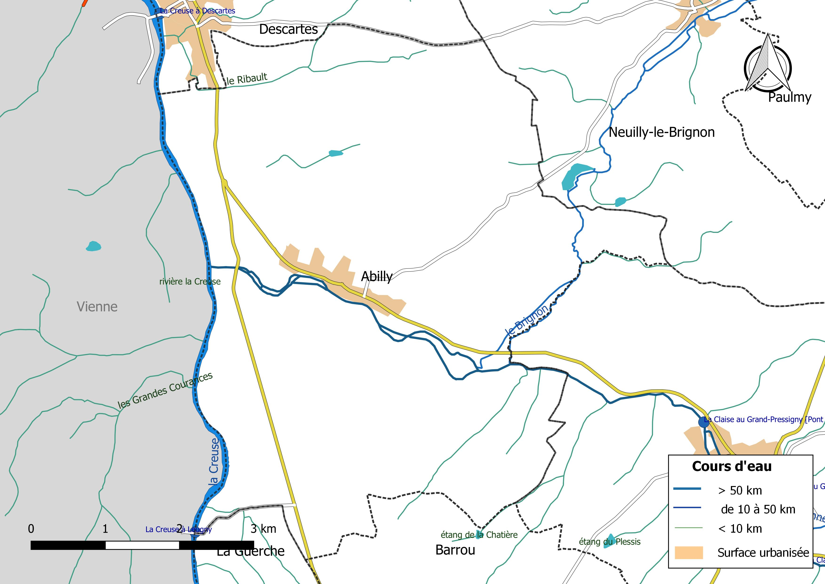 Carte du réseau hydrographique de la commune de Abilly (France).